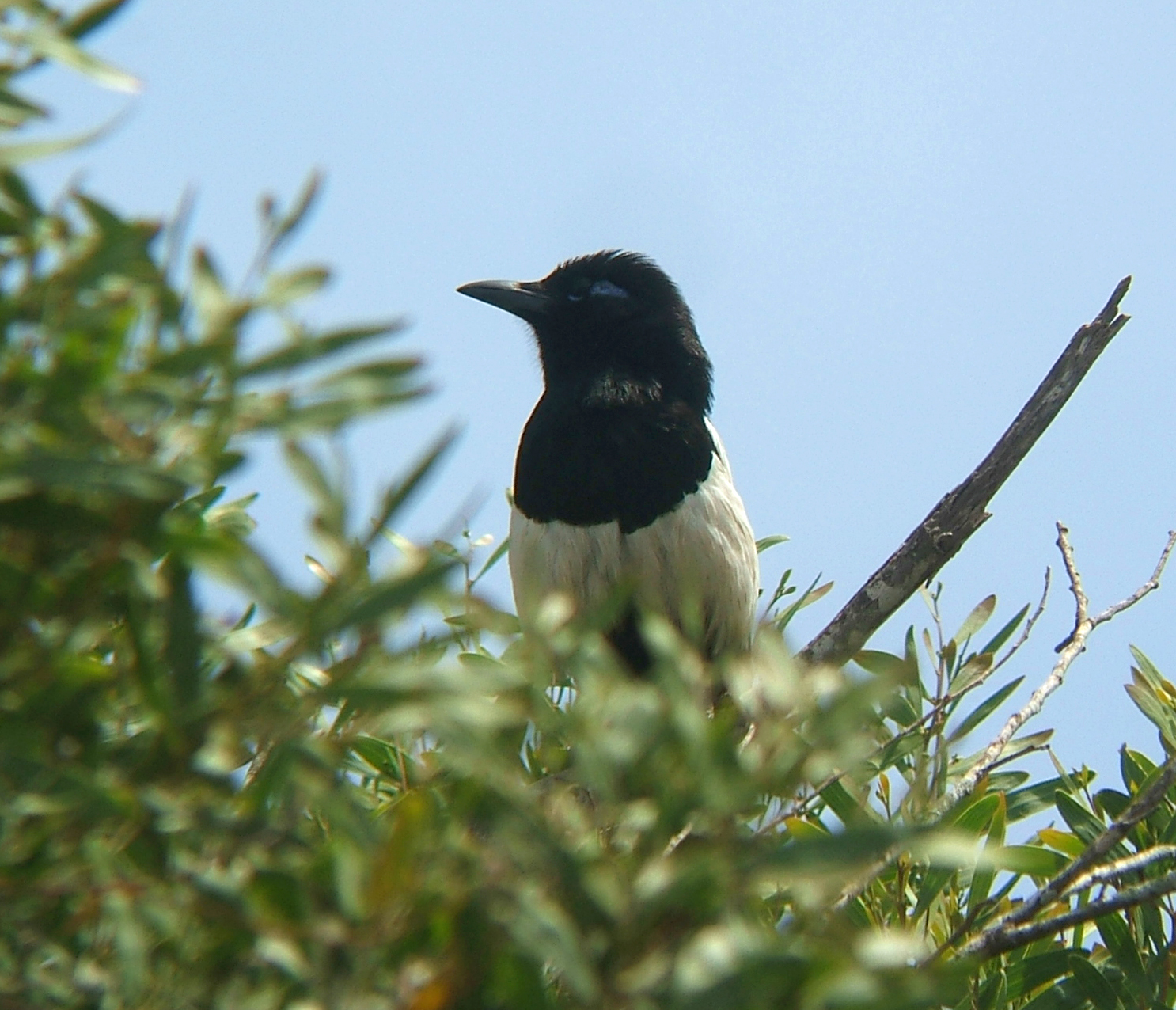 Pica pica mauretanica, Oued Massa National Park, Morocco